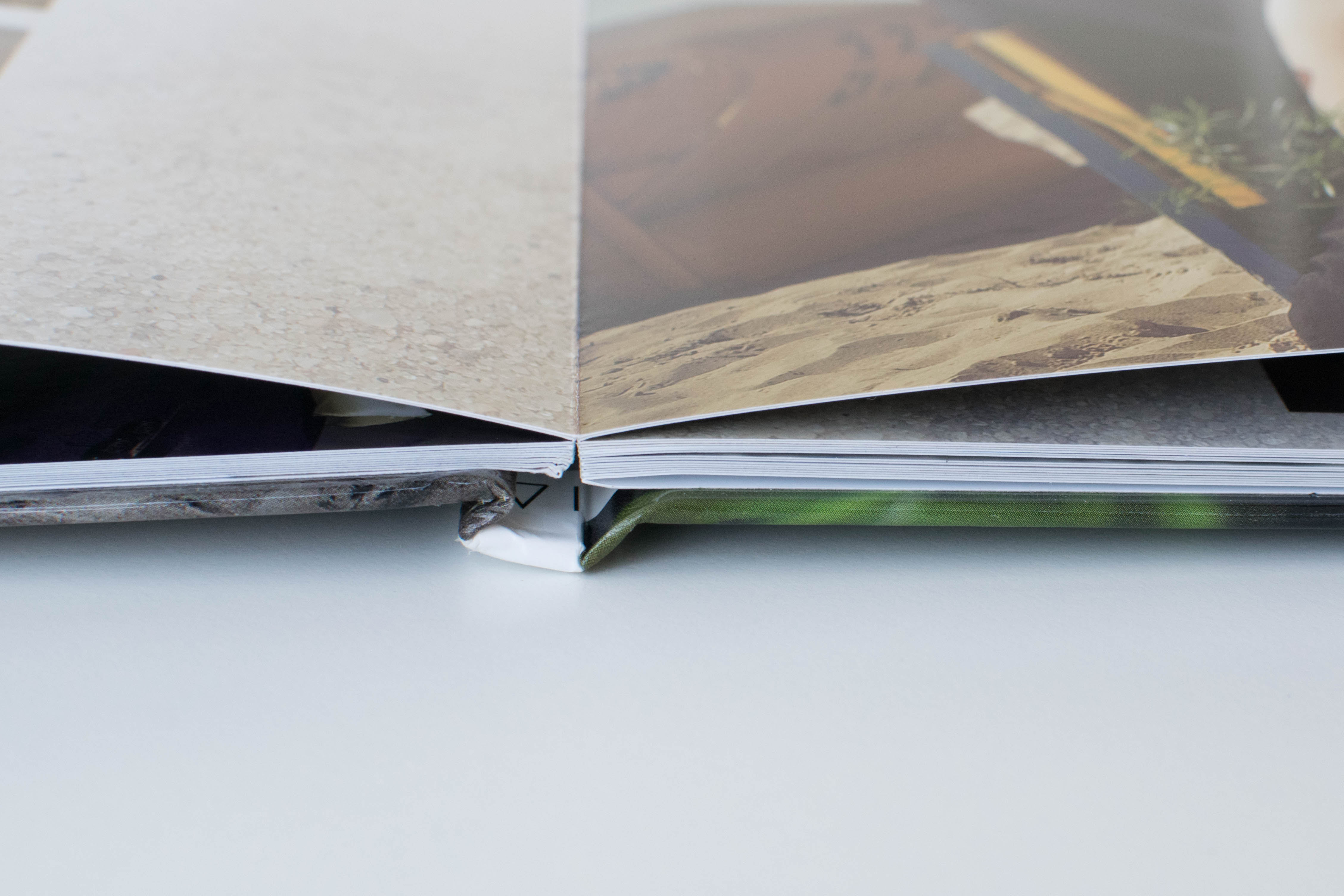 Aufgeklapptes Fotobuch auf Fotopapier mit Hardcover und Leporello-Bindung